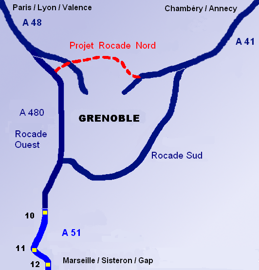 autoroute A51 près de Grenoble avec ses échangeurs